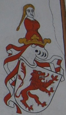 Wappen des Berchthold von Hertenberg im Chor der Schlachtkapelle bei Sempach